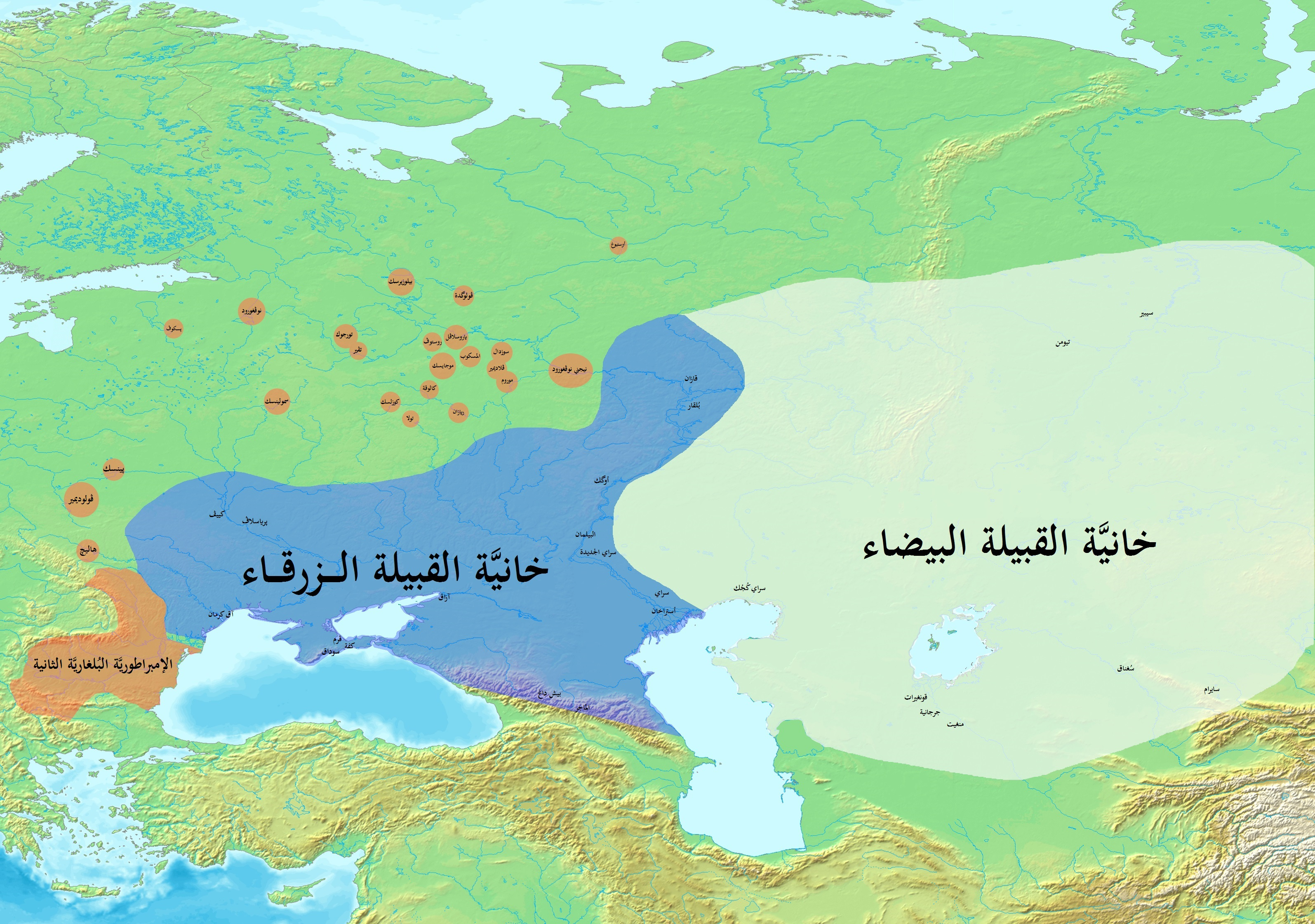 جناحا خانيَّة القبيلة الذهبيَّة: القبيلتان الزرقاء والبيضاء، سنة 1313م.